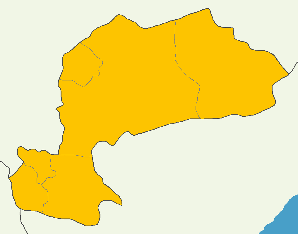 Karaman'da 2014 Türkiye cumhurbaşkanlığı seçimi sonuçları